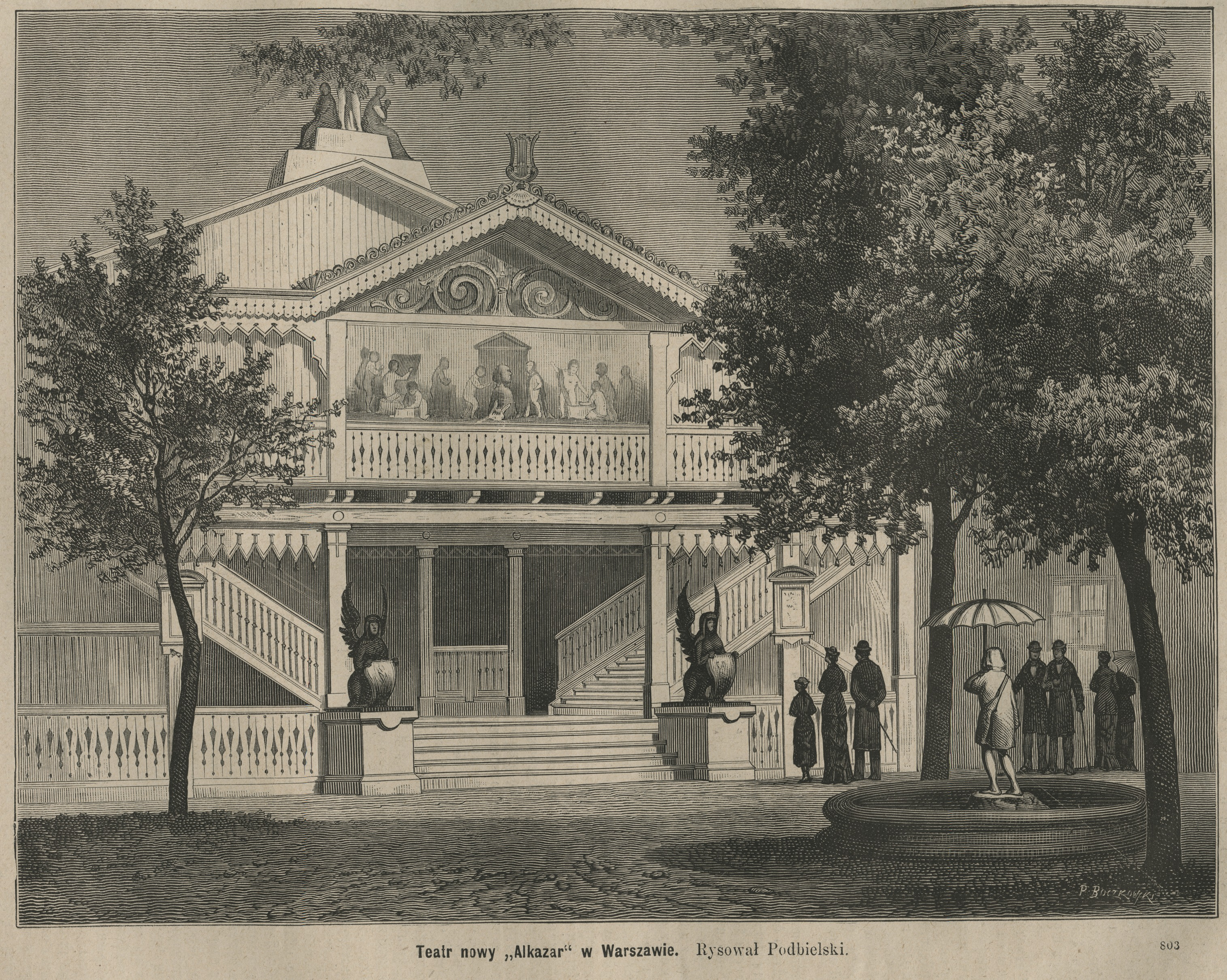 Teatr Nowy Alkazar w Warszawie